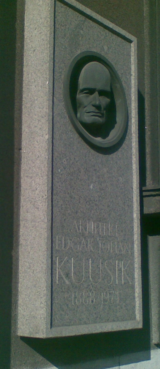 Edgar Johan Kuusiku bareljeef Gonsiori 17 Tallinnas, 11.05.2011.